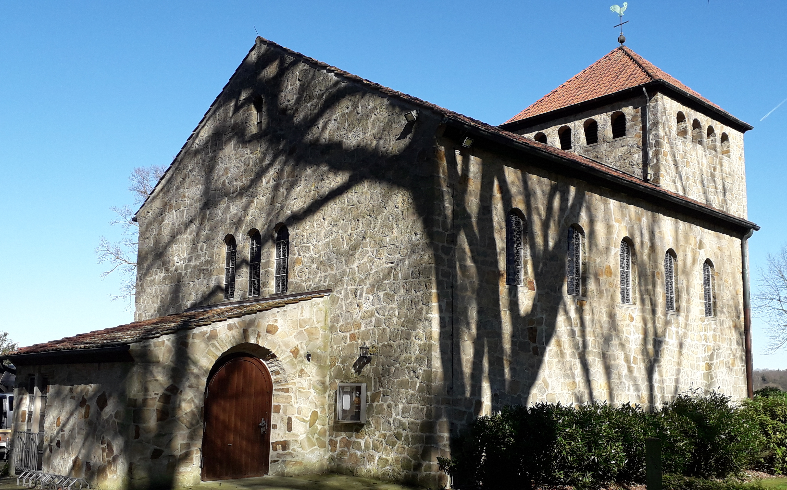 This church was built by the architect Hans Ostermann in postwar Westalia on the countryside for farmers who could not reach the main church in Greven anymore because of the bombed bridges crossing the Dortmund-Ems canal .